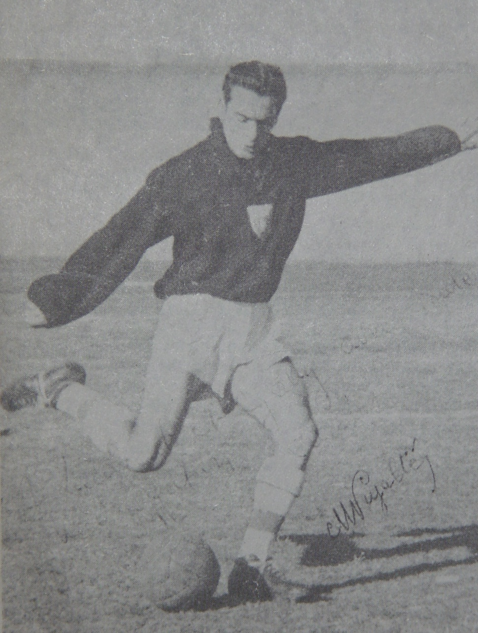 Marcel Pujalté - Photo Footbal